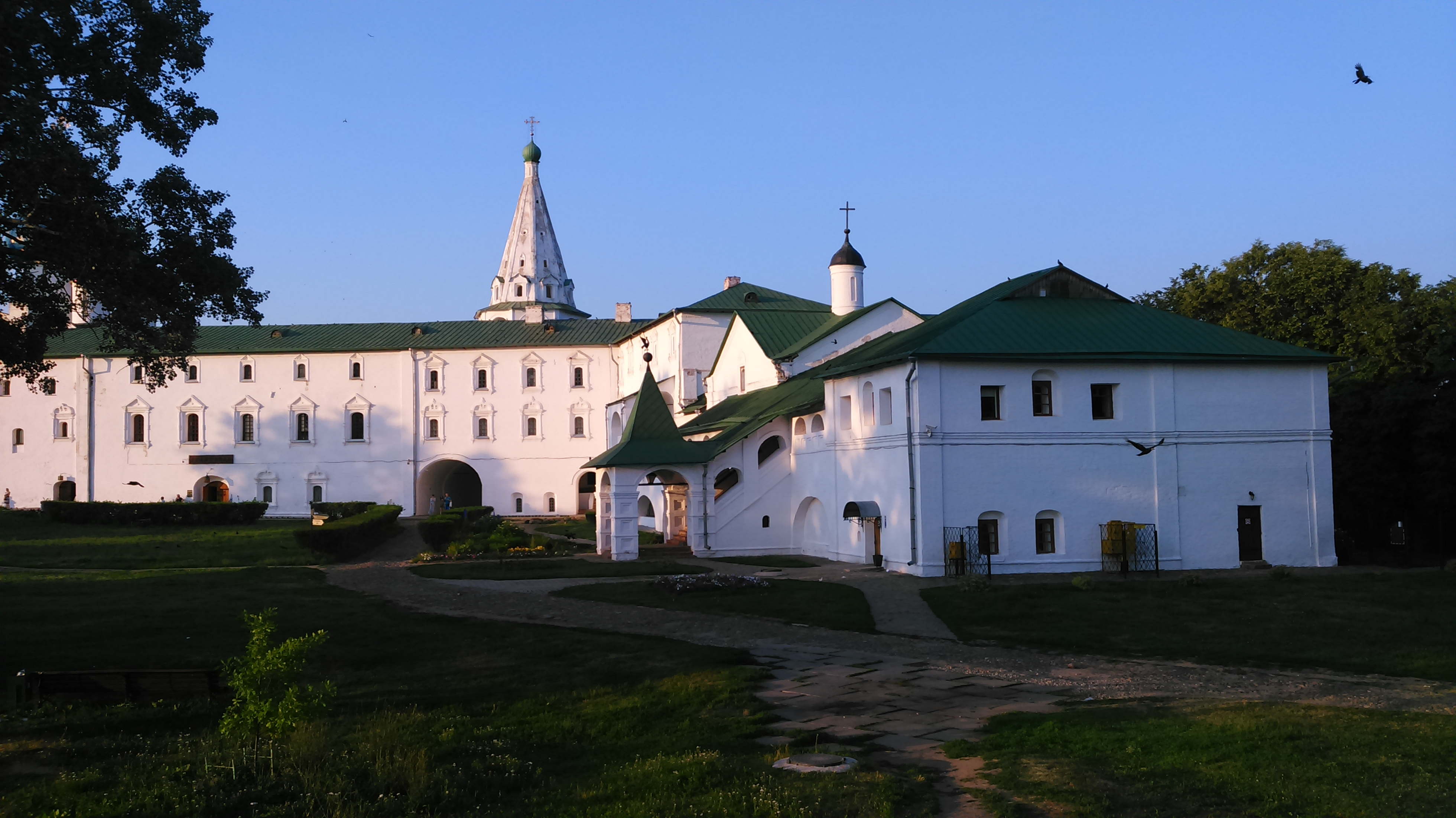 Суздальский кремль, Архиерейские палаты. Суздальский музей-заповедник